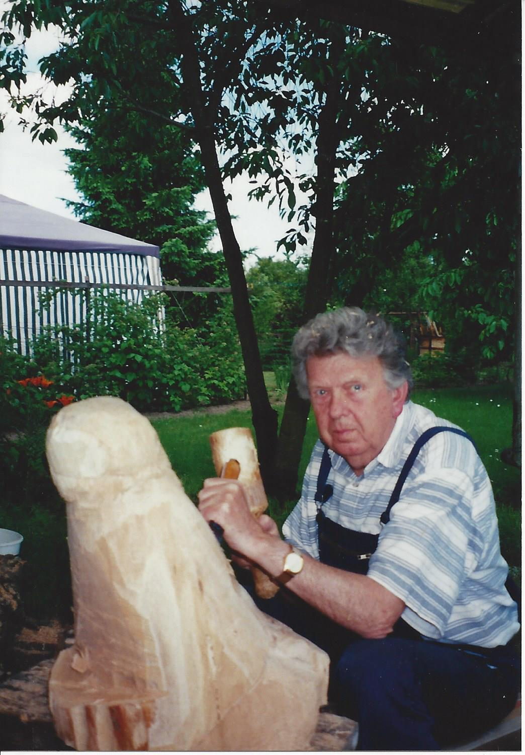 Fotografie von Friedrich Lorenz beim Holzschnitzen.